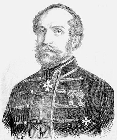 báró Prónay Gábor (1812–1875) jogász, néprajzi és kertészeti szakíró, császári királyi kamarás, evangélikus egyházi főfelügyelő, a Magyar Tudományos Akadémia levelező tagja (Vasárnapi Ujság, 1857. november 22.)